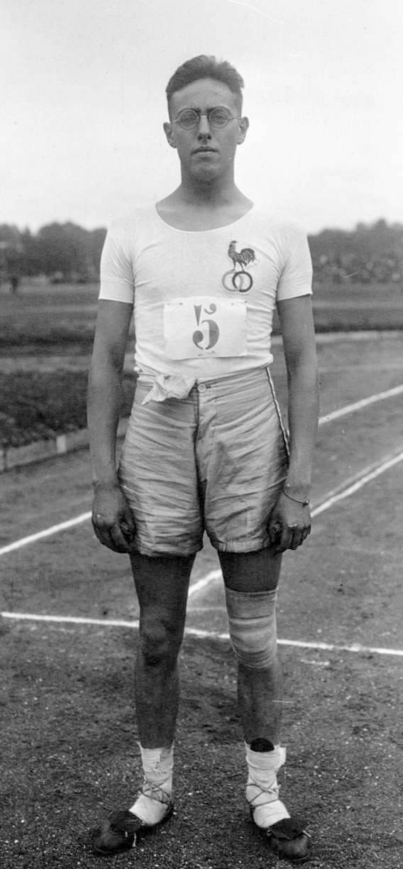 Colombes : match d'athlétisme France - Angleterre : Bernard gagnant le 110 m haies : [photographie de presse] / Agence Meurisse